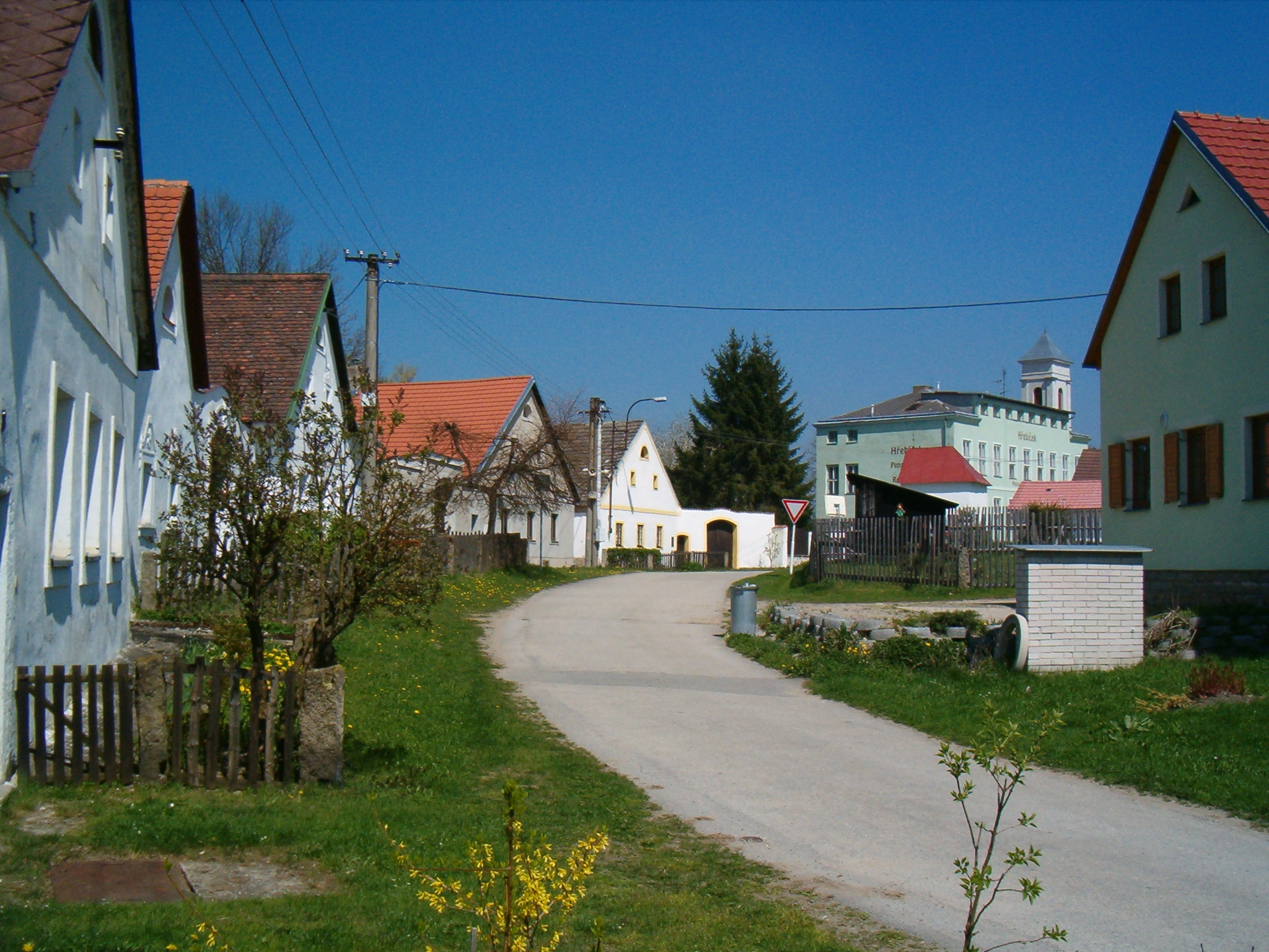 Náves v Blatě